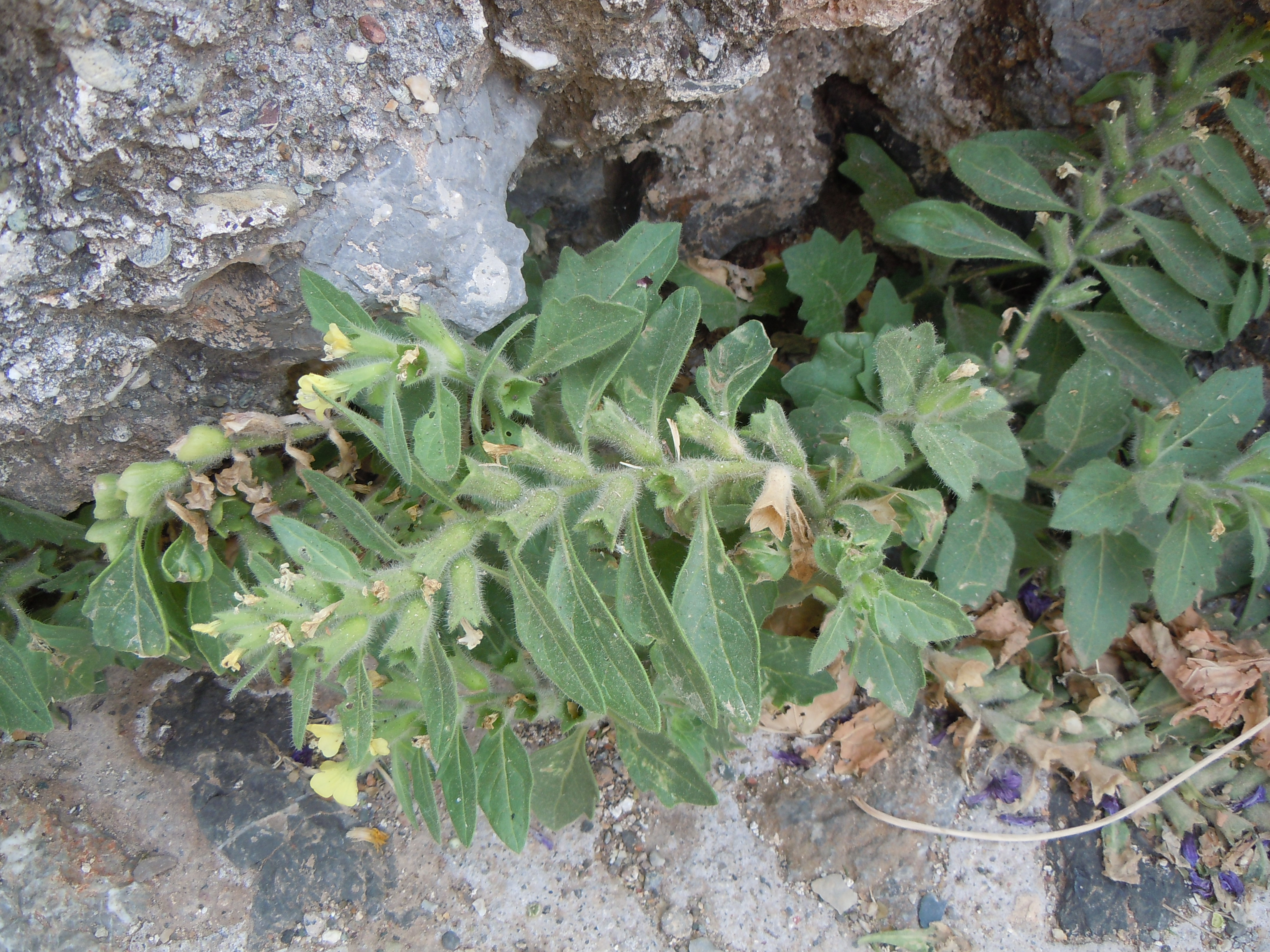 Hyoscyamus albus à Monemvasia - feuilles